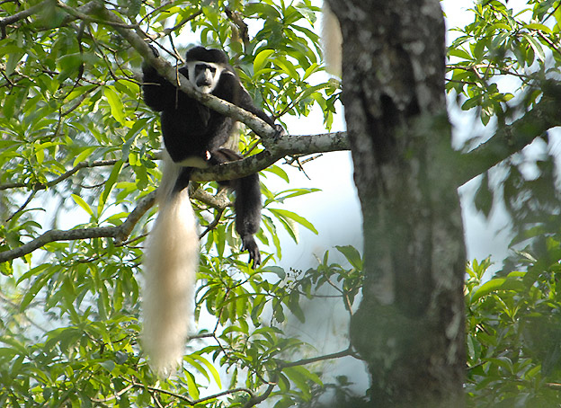 Colobe guereza Tanzanie 12-2006